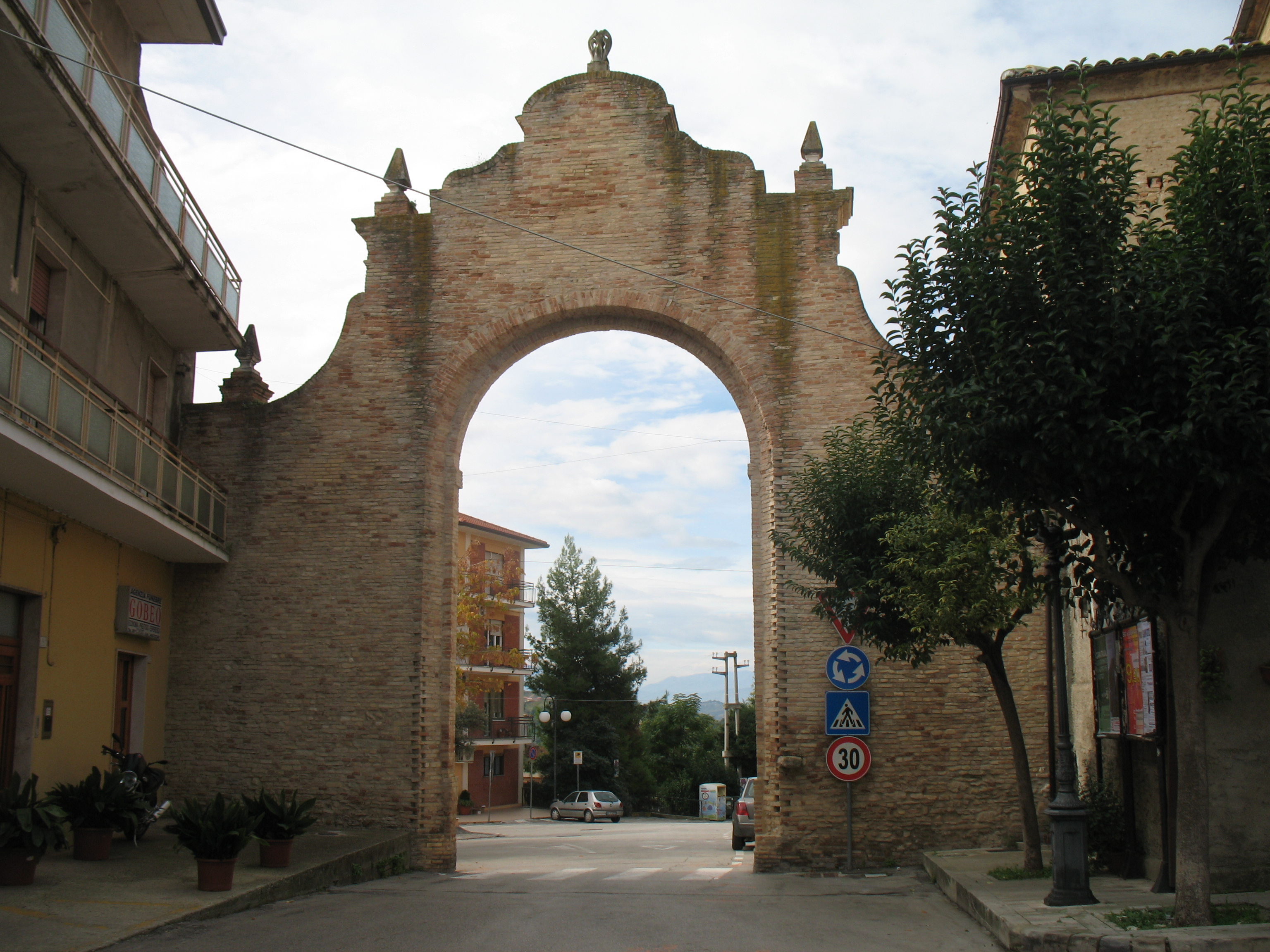 Questo rappresentava in passato uno degli unici due ingressi al centro di Villamagna, che nel Medioevo servivano a proteggere l’abitato dalle frequenti incursioni di Turchi e briganti.